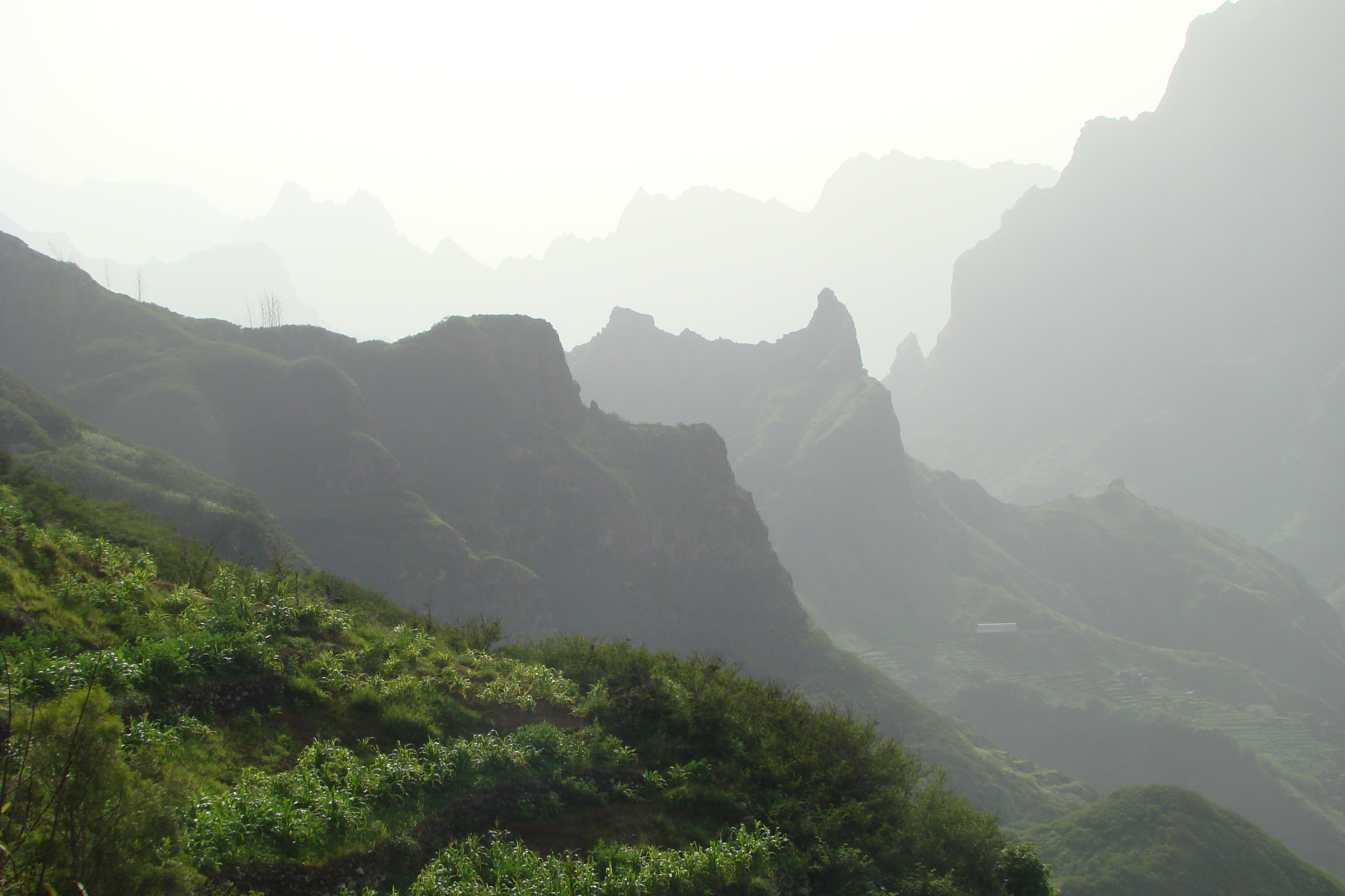 Cabecera del Valle de Ribeira Grande (Santo Antao) al atardecer